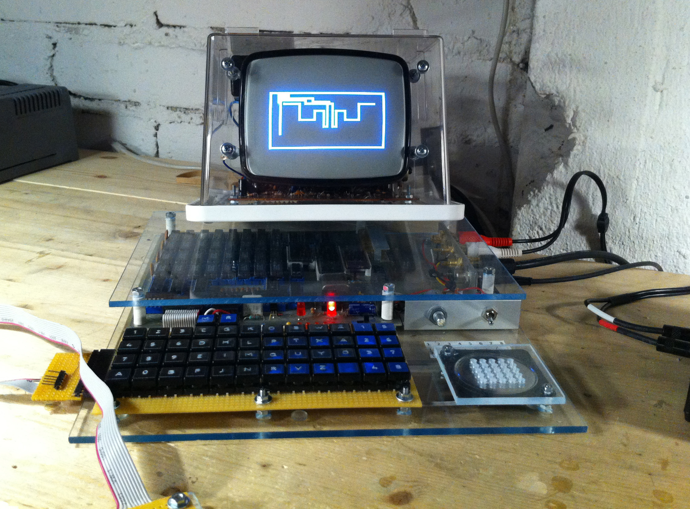 Matopeli Telmac-1800 tietokoneessa